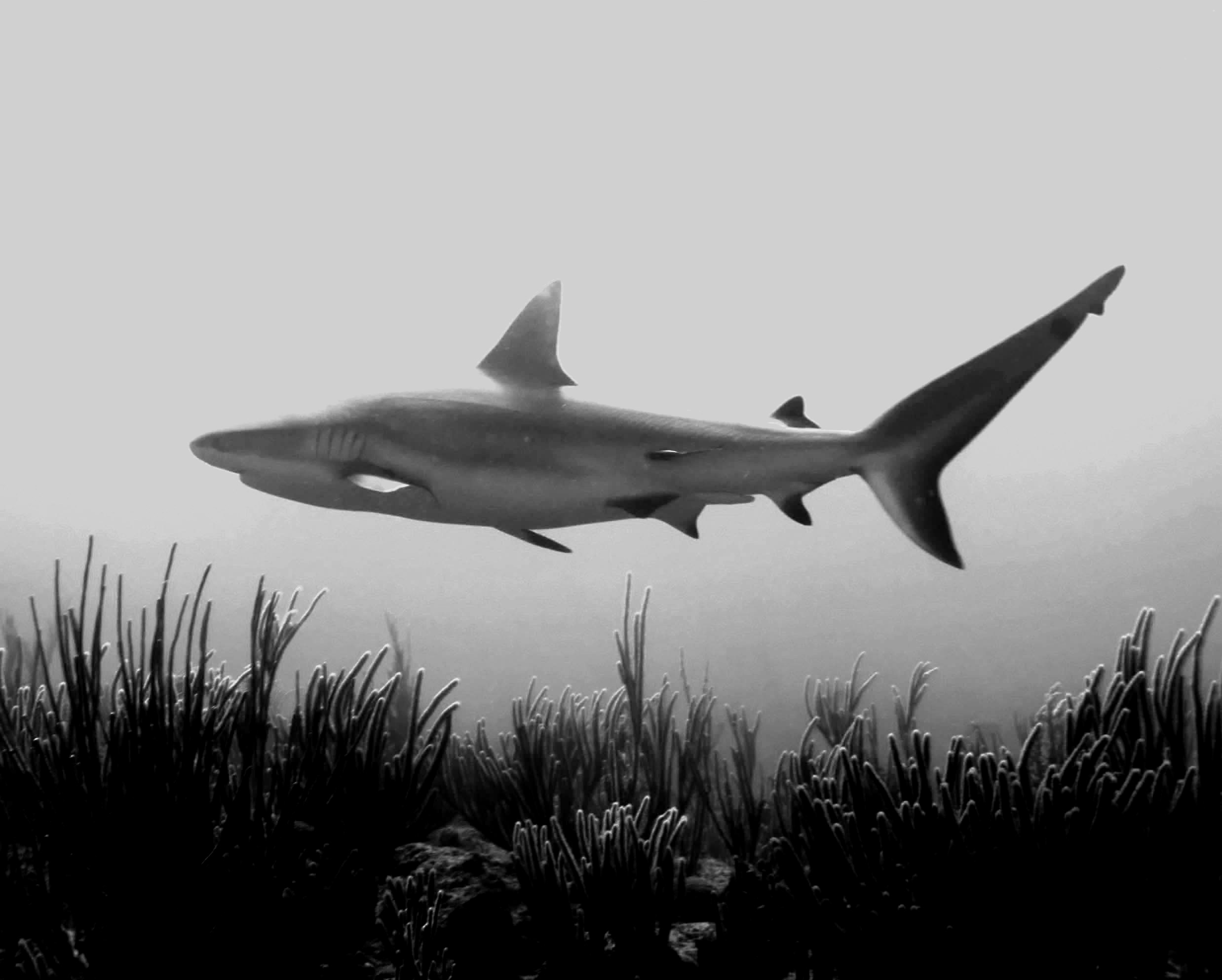 Carcharhinus perezi